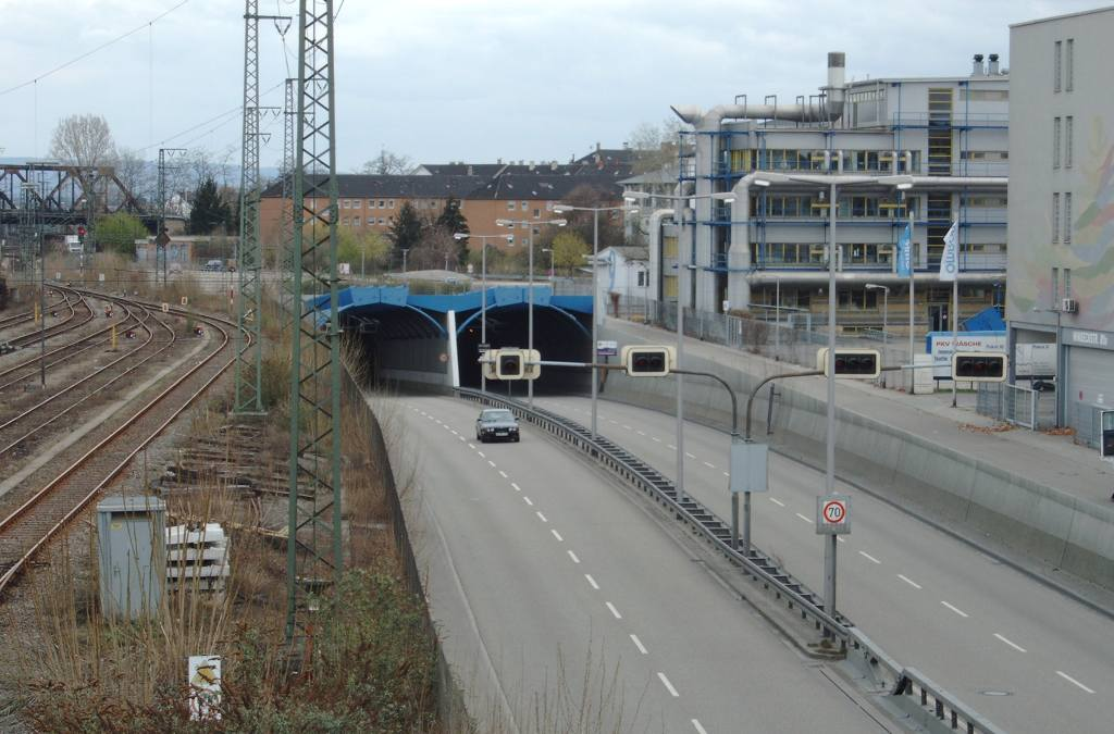 Fahrlachtunnel in Mannheim